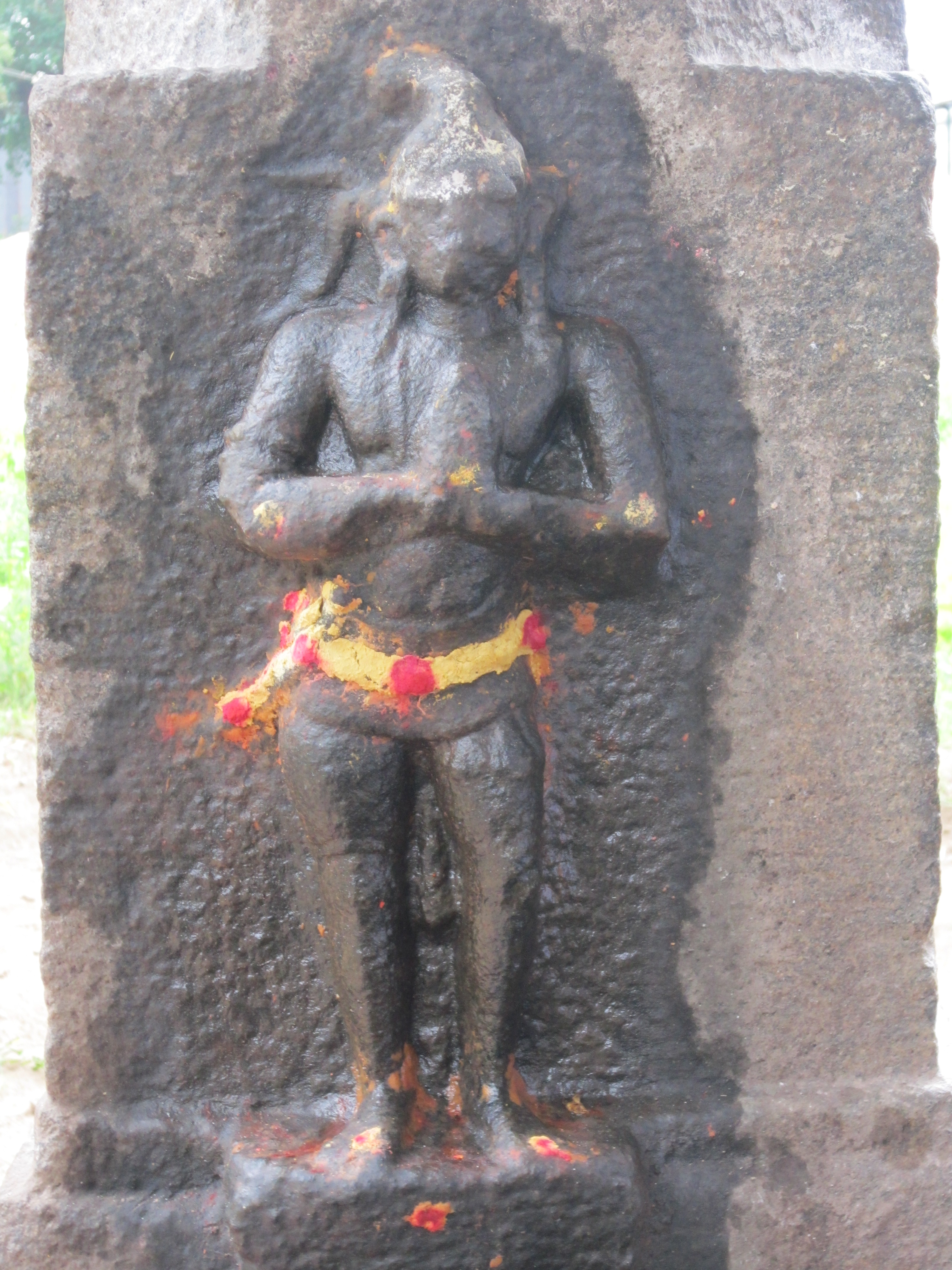 தென்காசி பாண்டியர்களின் குல குருவான விந்தையர் சித்தரின் சமாதி. குருவை வணங்கி நிற்கும் சடையவர்மன் பராக்கிரம பாண்டியன்.